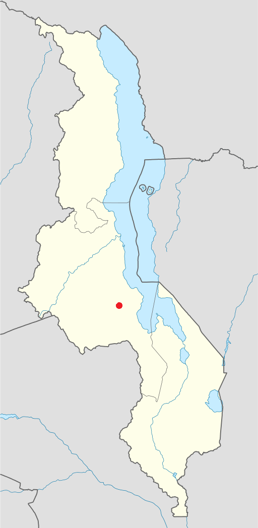 Localización de Chezi en Malawi